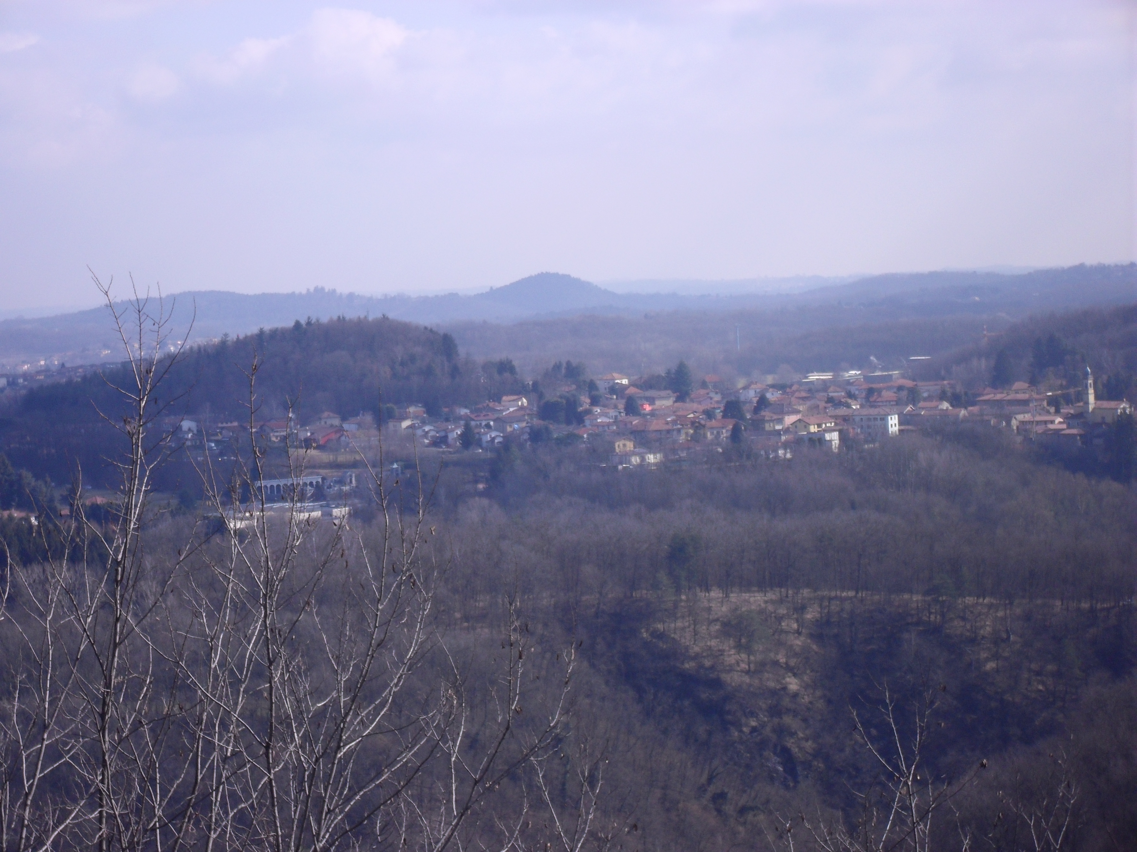 Panorama della frazione di Casanova Lanza